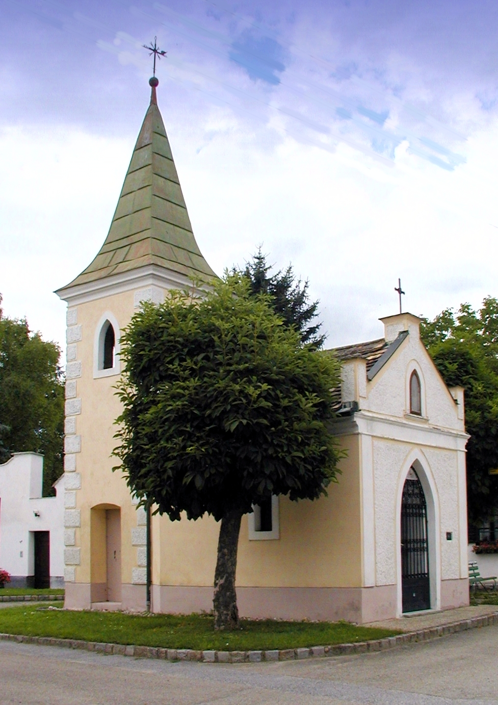 Ortskapelle Antonius von Padua in Kleinkirchberg, Sitzendorf an der Schmida Object location48° 35′ 40.16″ N, 15° 56′ 02.8″ E